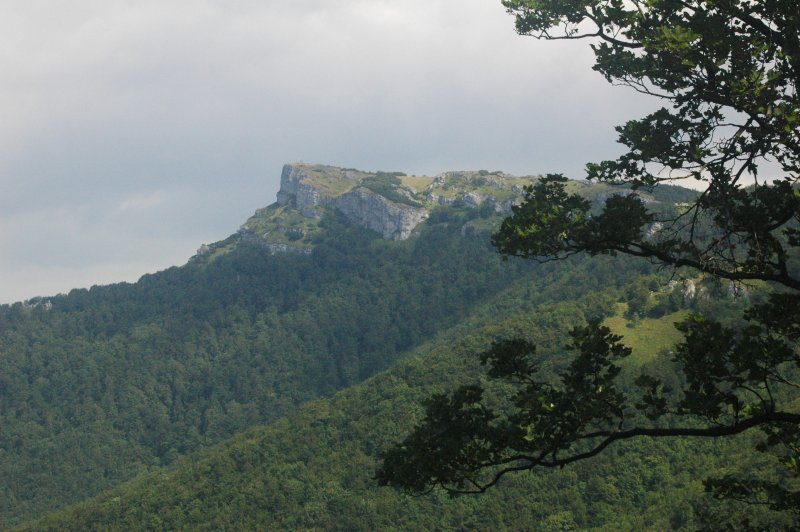 Kľak, summit